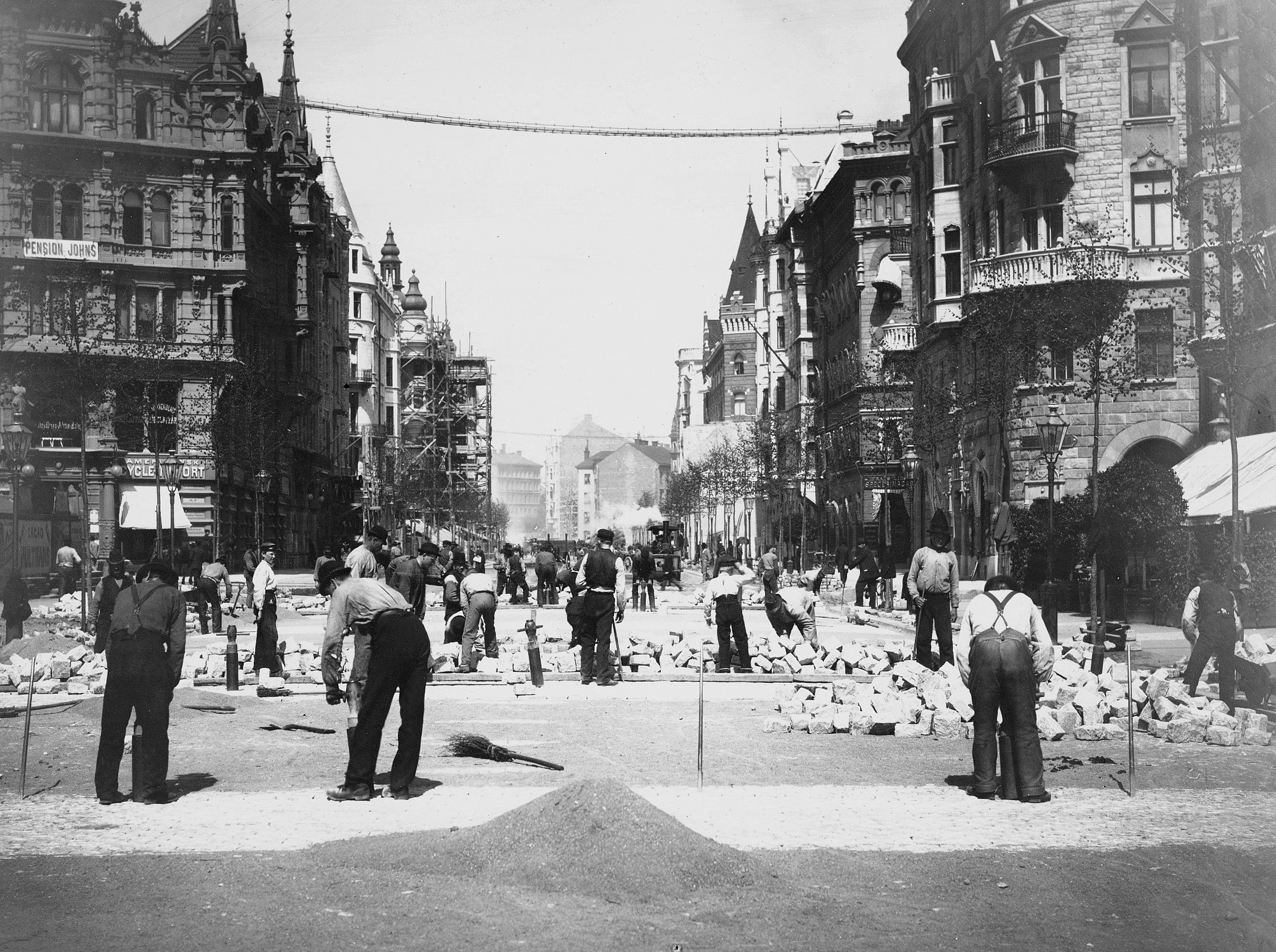 Birger Jarlsgatan i Stockholm. Till vänster Birger Jarls basar, uppförd 1884-1887.